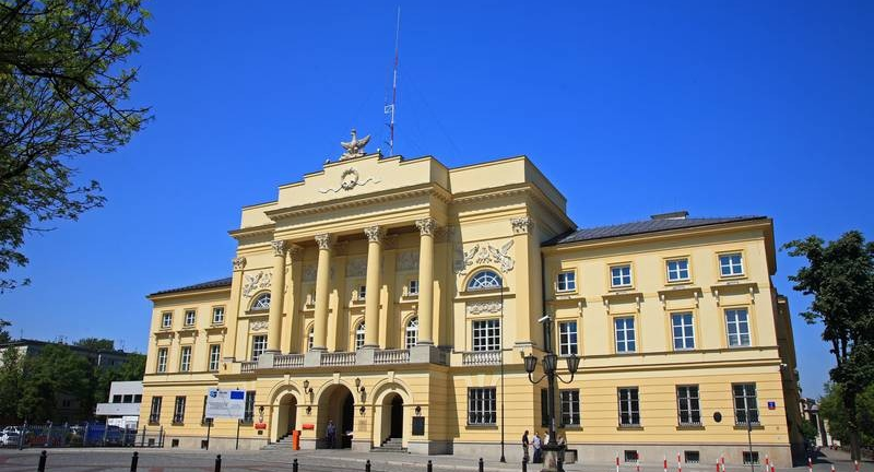 Warszawa (Polska)